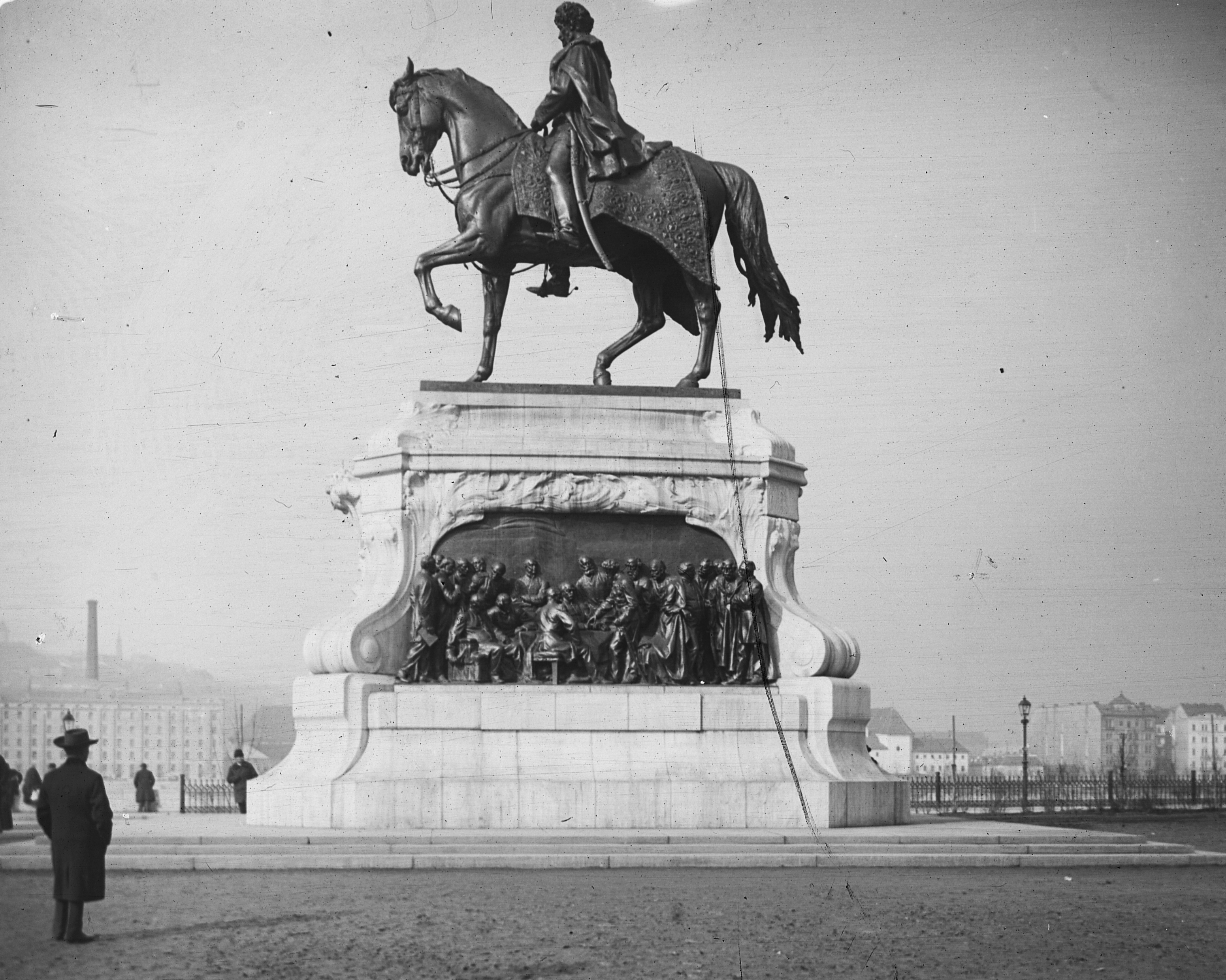 Az Andrássy emlékmű a Parlamentnél